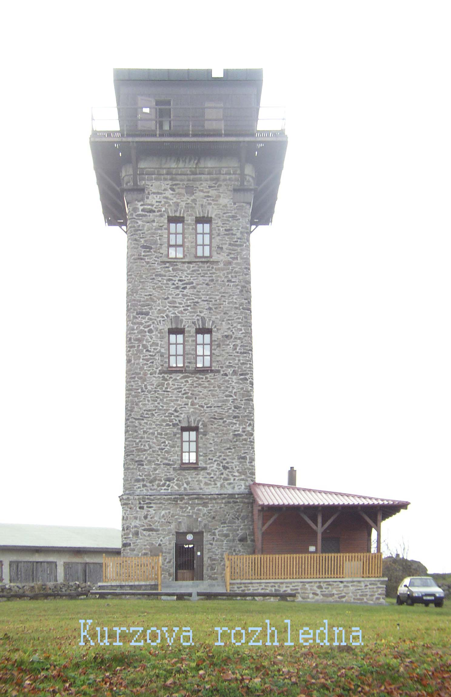 Kurzova rozhledna